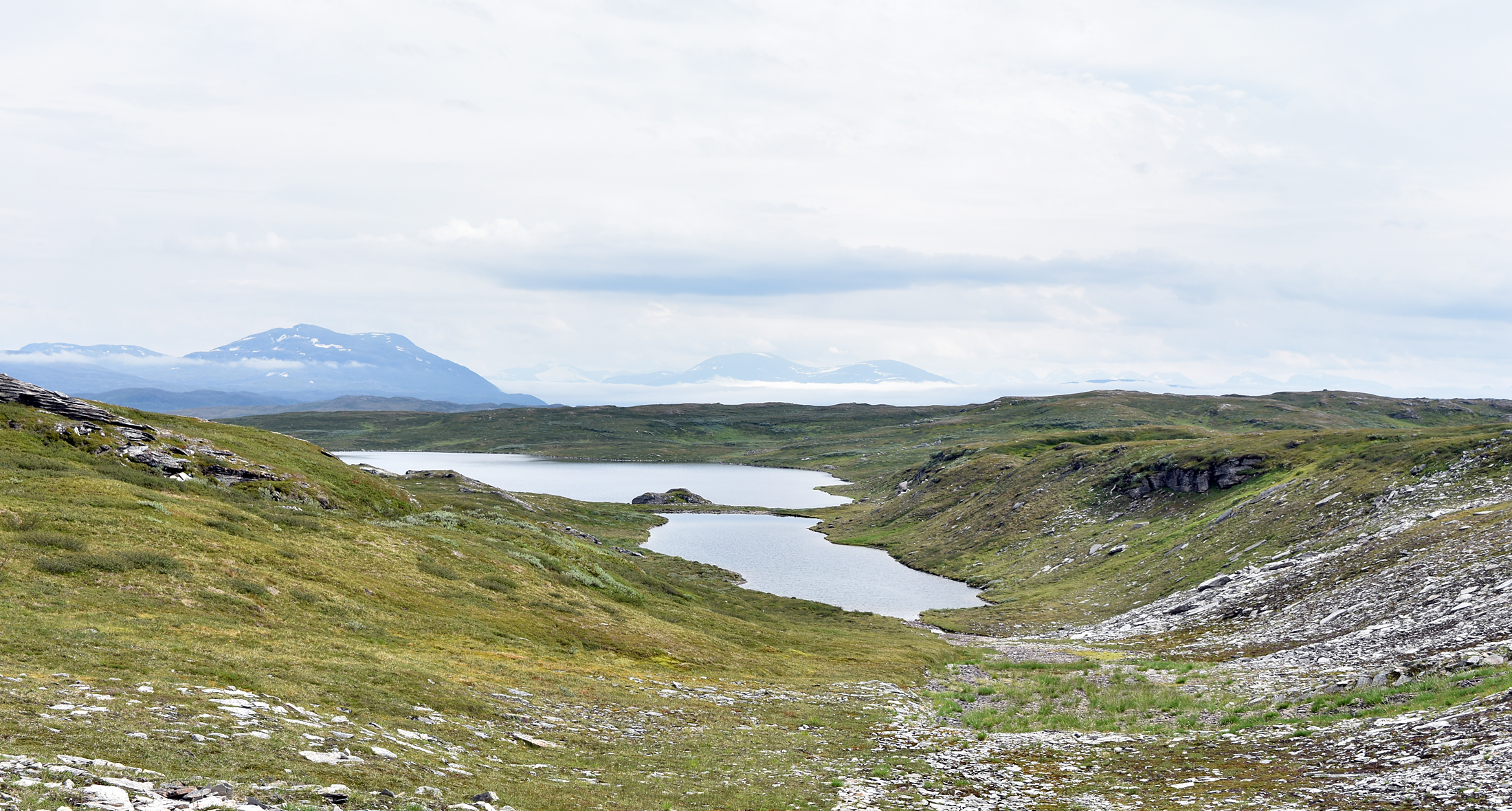 Den största av småsjöarna i Gålmmålåhkjávrátja med en mindre sjö i förgrunden. Vy mot öster.